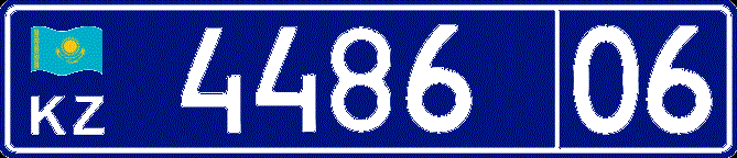 Автомобильный номер полиции и МЧС Республики Казахстан образца 2015 года.